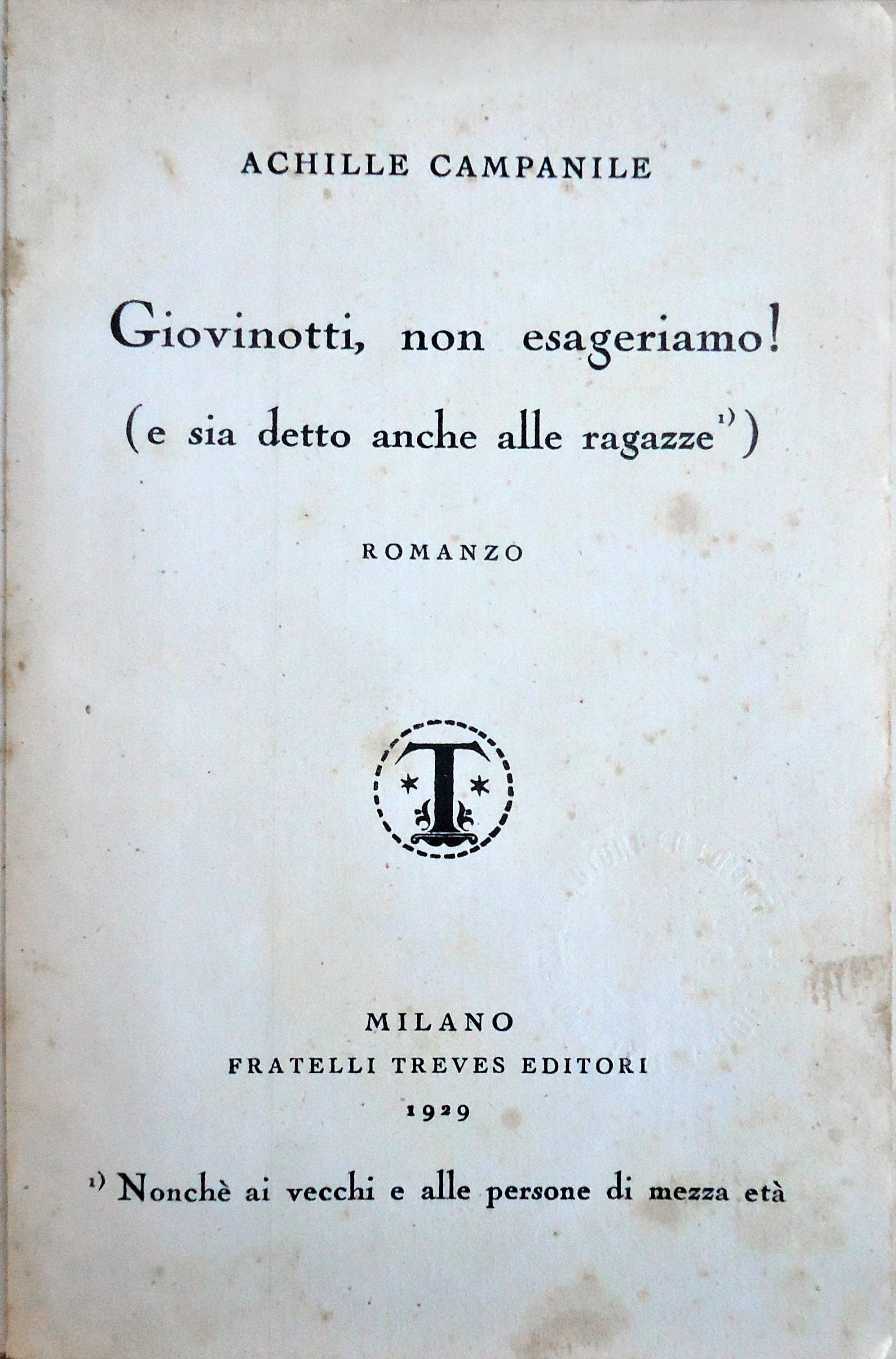 Il titolo completo è Giovinotti, non esageriamo! (e sia detto anche alle ragazze) Nonché ai vecchi e alle persone di mezza età. Romanzo